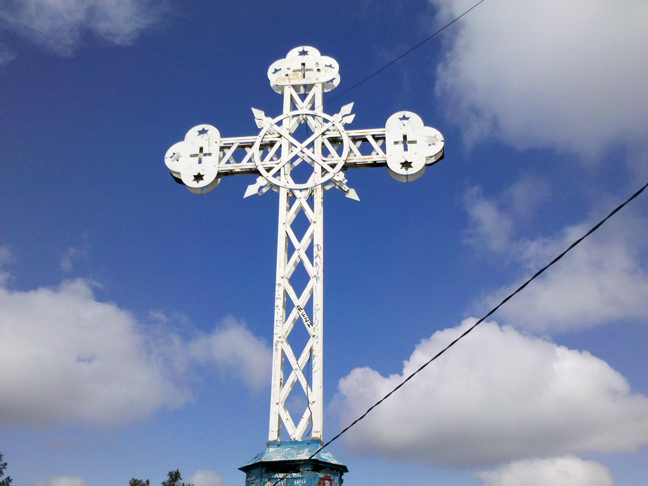 Vista de la cruz de metal ubicada en la cima del cerro Gulutren en la comuna de Peumo - Chile.